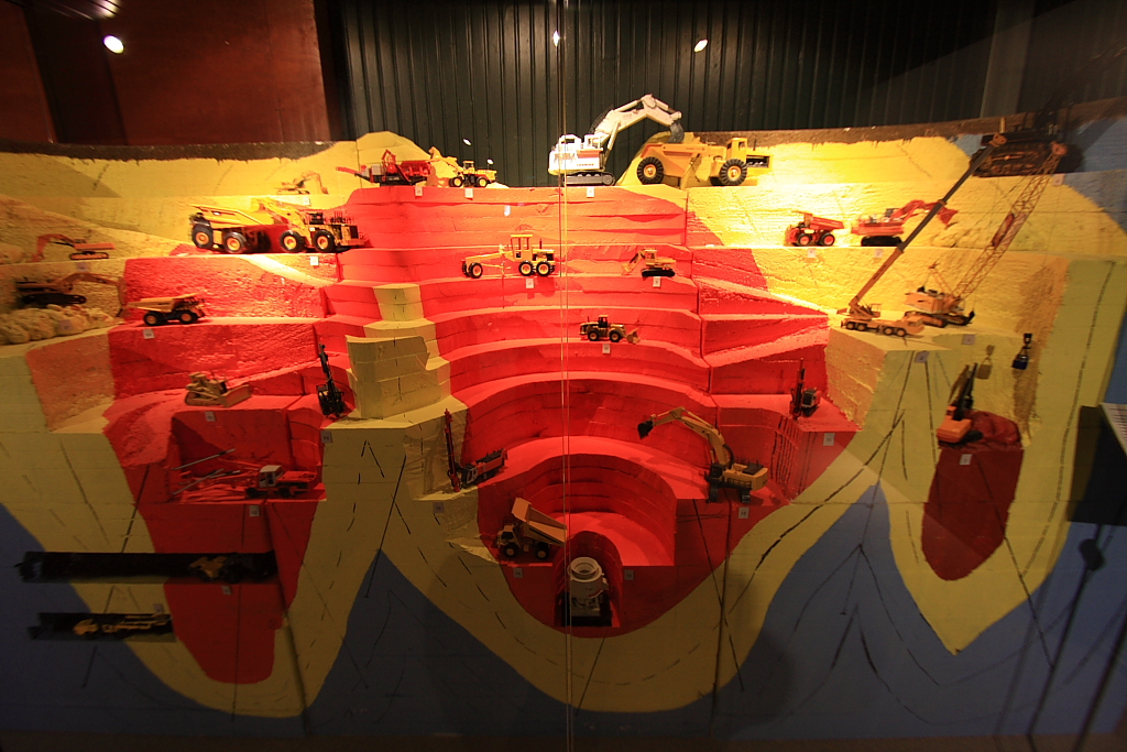 Avolouhoksen pienoismalli Outokummun Kaivosmuseon perusnäyttelyssä.